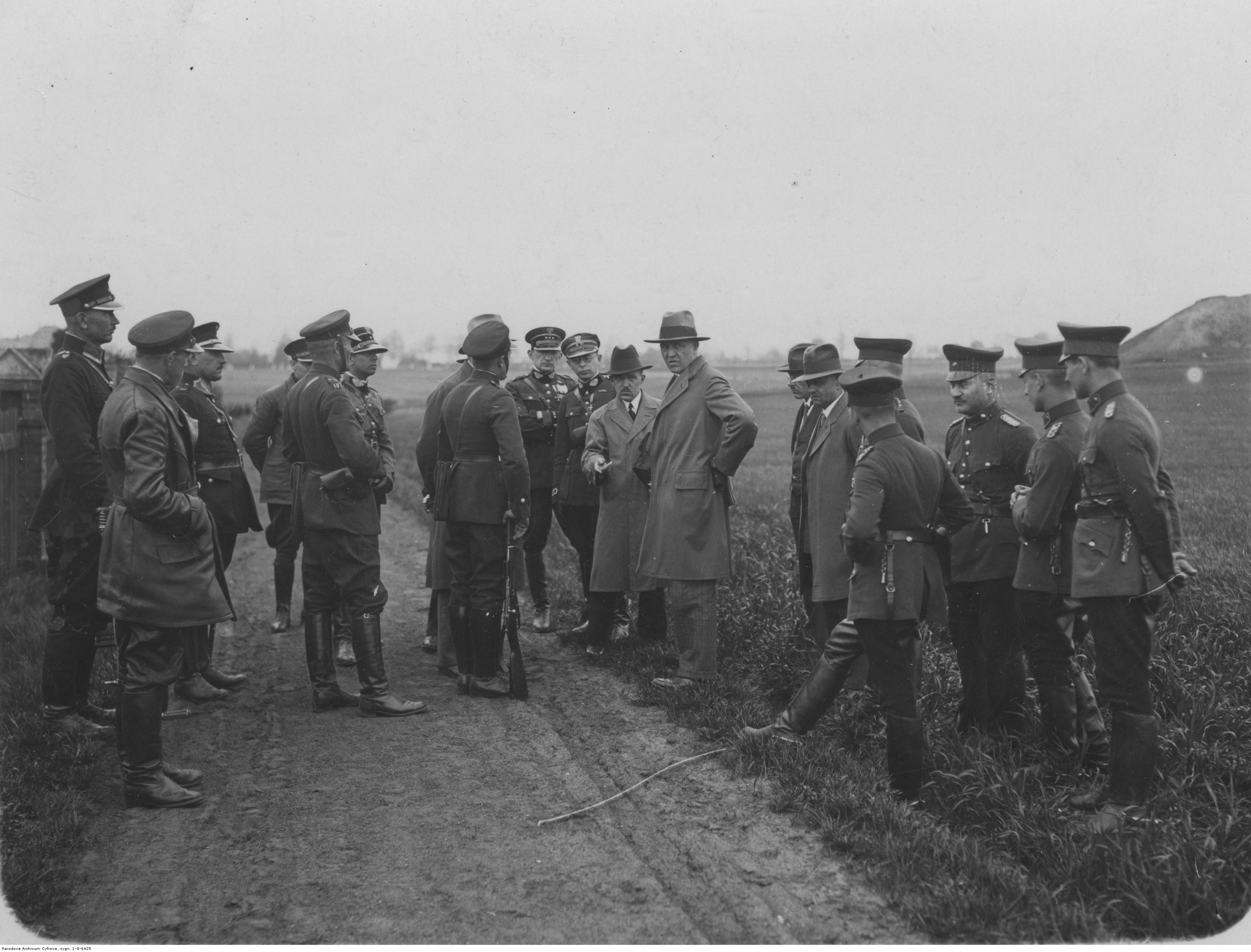 Mieszana komisja graniczna polsko-niemiecka na terenie Inspektoratu Straży Granicznej Królewska Huta; 1931-05-08. Koncern Ilustrowany Kurier Codzienny - Archiwum Ilustracji. Sygnatura: 1-G-6425